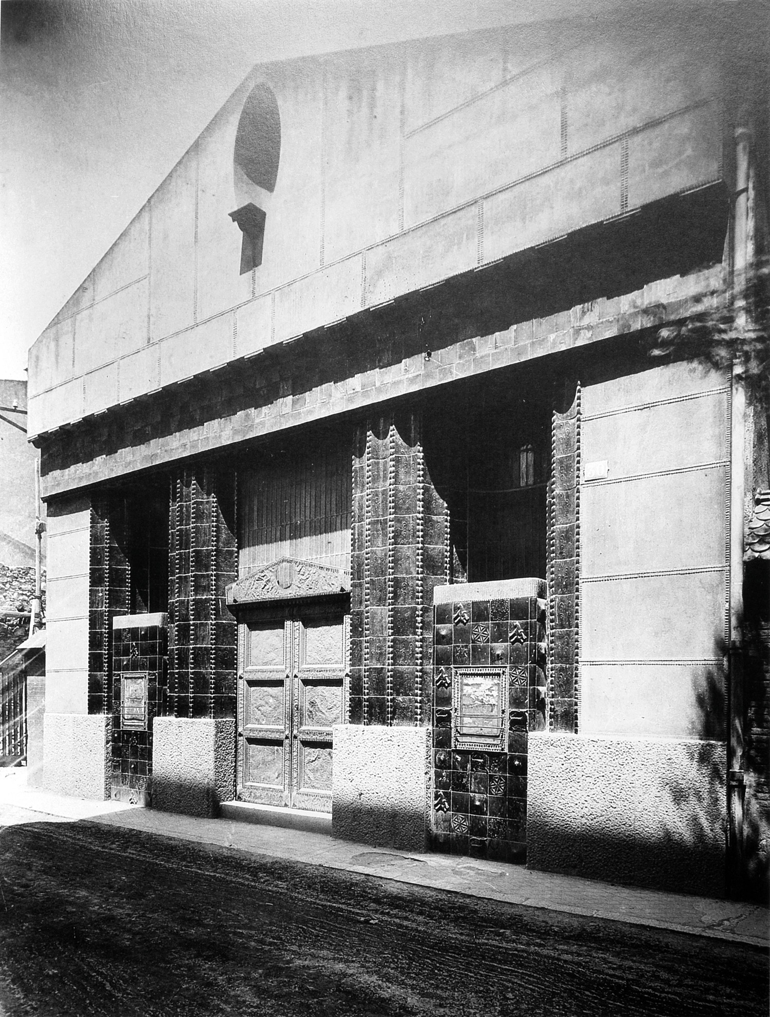 Sala d'exposicions i concerts